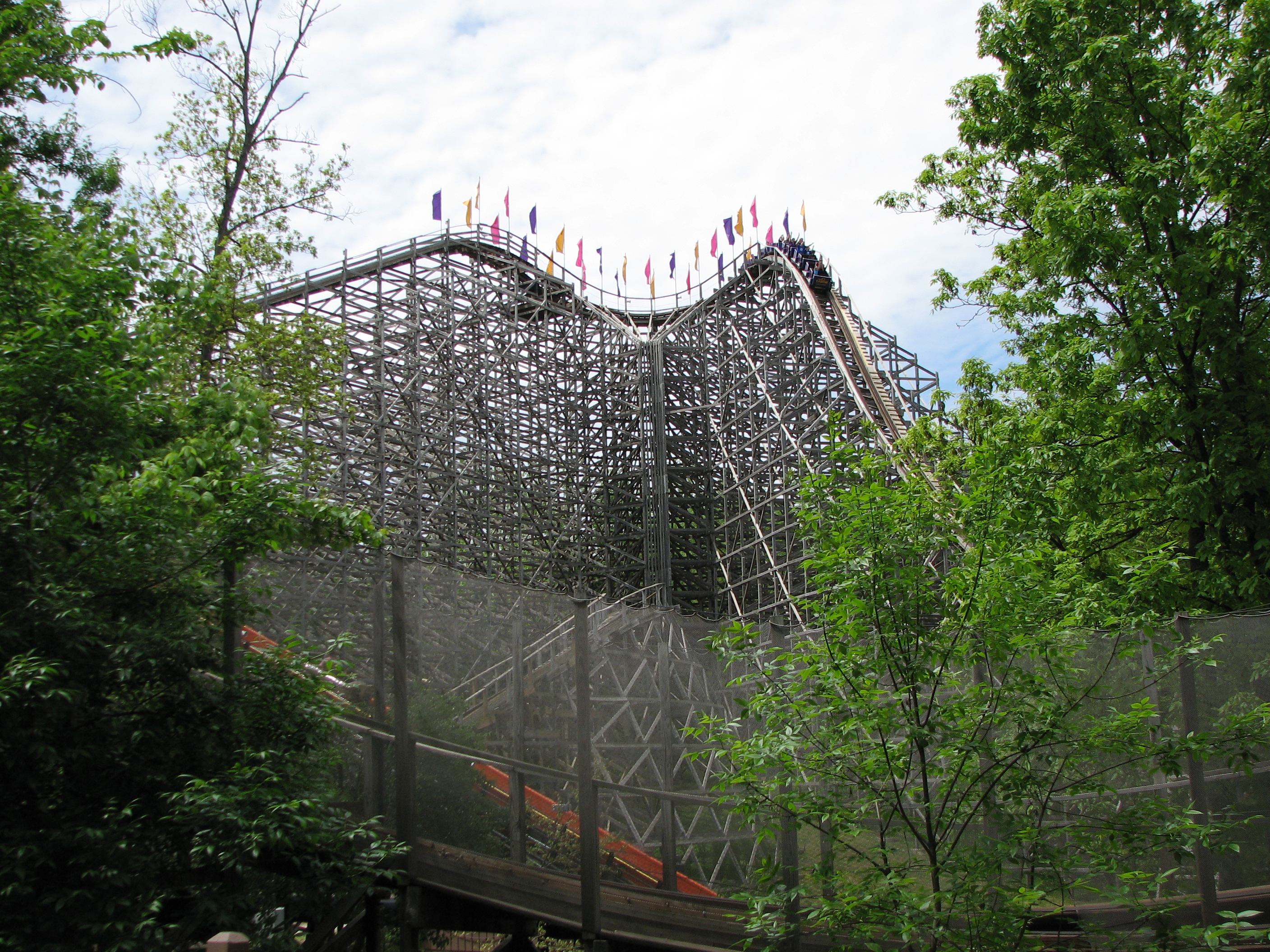 Die Holzachterbahn The Legend im Themenpark Holiday World